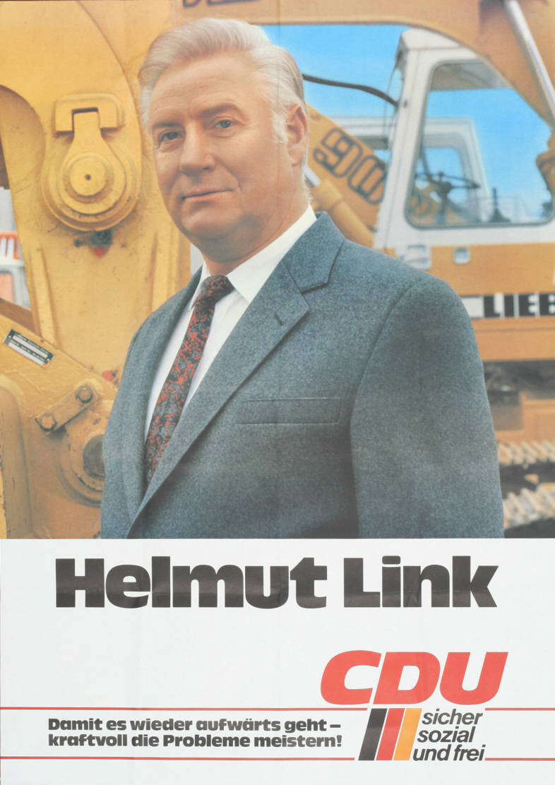 Helmut Link Damit es wieder aufwärts geht - kraftvoll die Probleme meistern! CDU sicher sozial und frei Abbildung: Foto - im Hintergrund Baufahrzeuge Plakatart: Kandidaten-/Personenplakat mit Porträt Objekt-Signatur: 10-001: 2668 Bestand: Plakate zu Bundestagswahlen (10-001) GliederungBestand10-18: Plakate zu Bundestagswahlen (10-001) » Die 10. Bundestagswahl am 6. März 1983 » CDU » Mit Porträtfoto Lizenz: KAS/ACDP 10-001: 2668 CC-BY-SA 3.0 DE